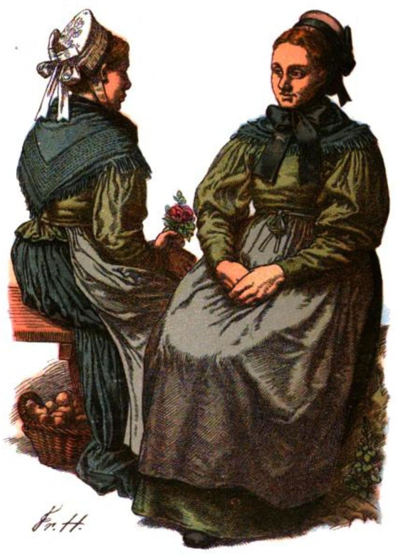 Friedrich Hottenroth: Nassauisches Trachtenbuch Tafel 26: Bäuerinnen aus dem goldenen Grund (Camberg, Würges) 1881